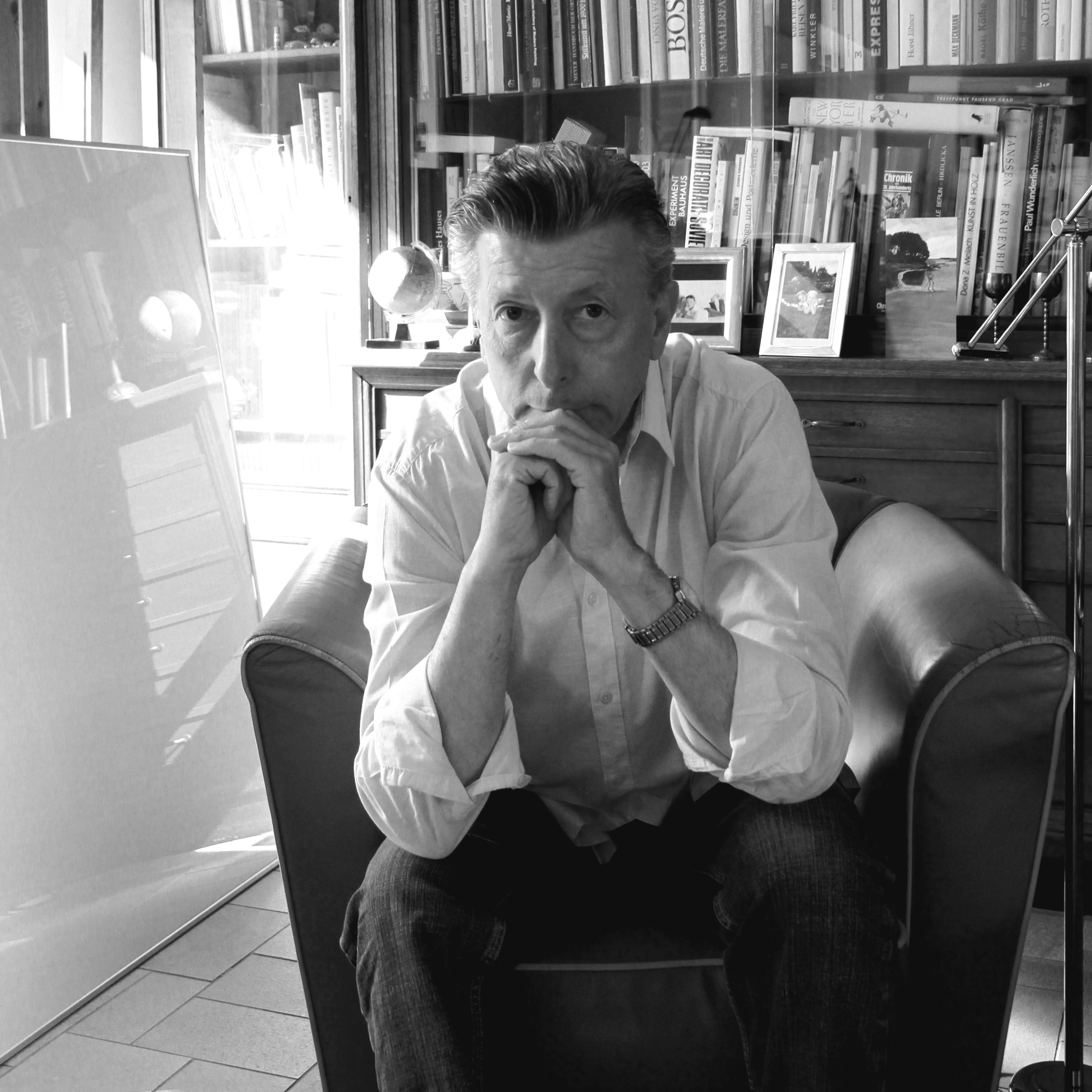 Portrait von Rainer Schade